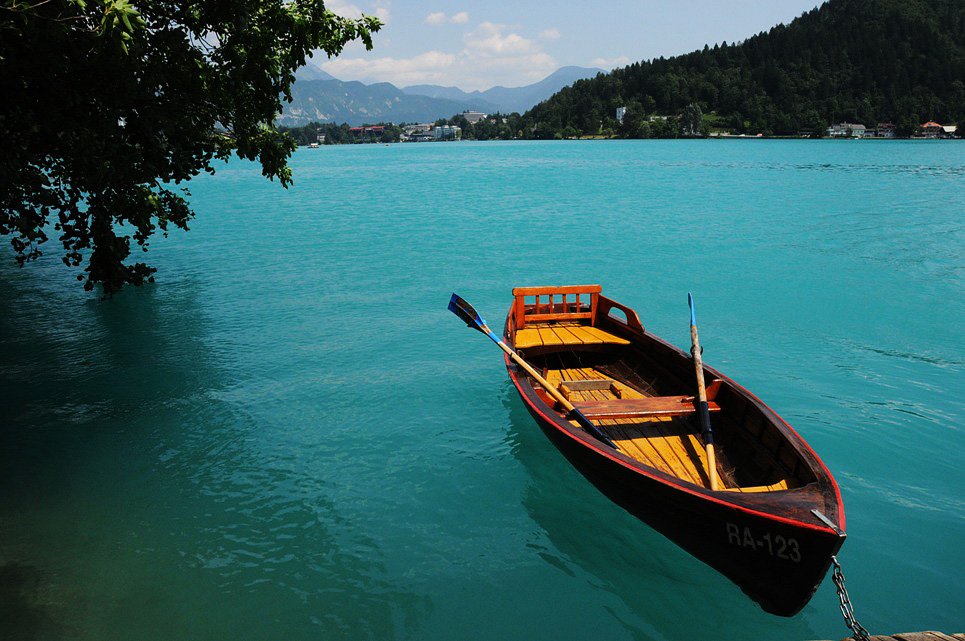 Bled, Slovenia